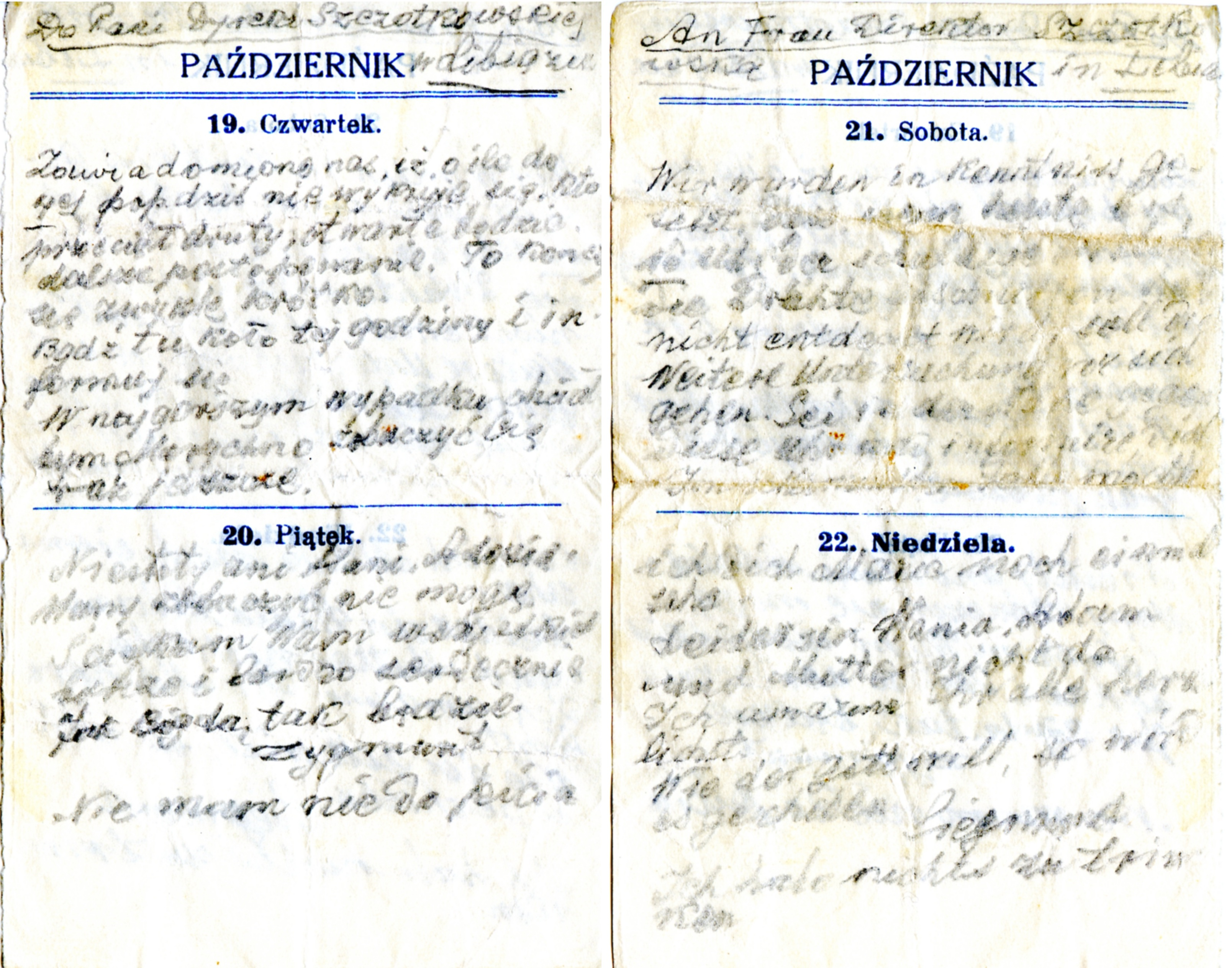 Gryps, przekazany rodzinie zatrzymanego w październiku 1939 przez niemieckie władze okupacyjne dyrektora kopalni "Janina" w Libiążu Zygmunta Szczotkowskiego. Gryps jest dwujęzyczny, po jednej stronie kartki z kalendarzyka po polsku, po drugiej to samo po niemiecku. Text Do Pani Dyrekt[orowej] Szczotkowskiej w Libiążu. Zawiadomiono nas, iż, o ile do 4ej pop[ołudniu] nie wyjaśni się, kto przeciął druty, otwarte będzie dalsze postępowanie. To kończy się zwykle krótko. Bądź tu koło tej godziny i informuj się. W najgorszym wypadku chciałbym Marychno zobaczyć Cię raz jeszcze. Niestety, ani Hani, Adasia i Mamy zobaczyć nie mogę. Ściskam Was wszystkich bardzo i bardzo serdecznie. Jak Bóg da, tak będzie. Zygmunt Nie mam nic do picia